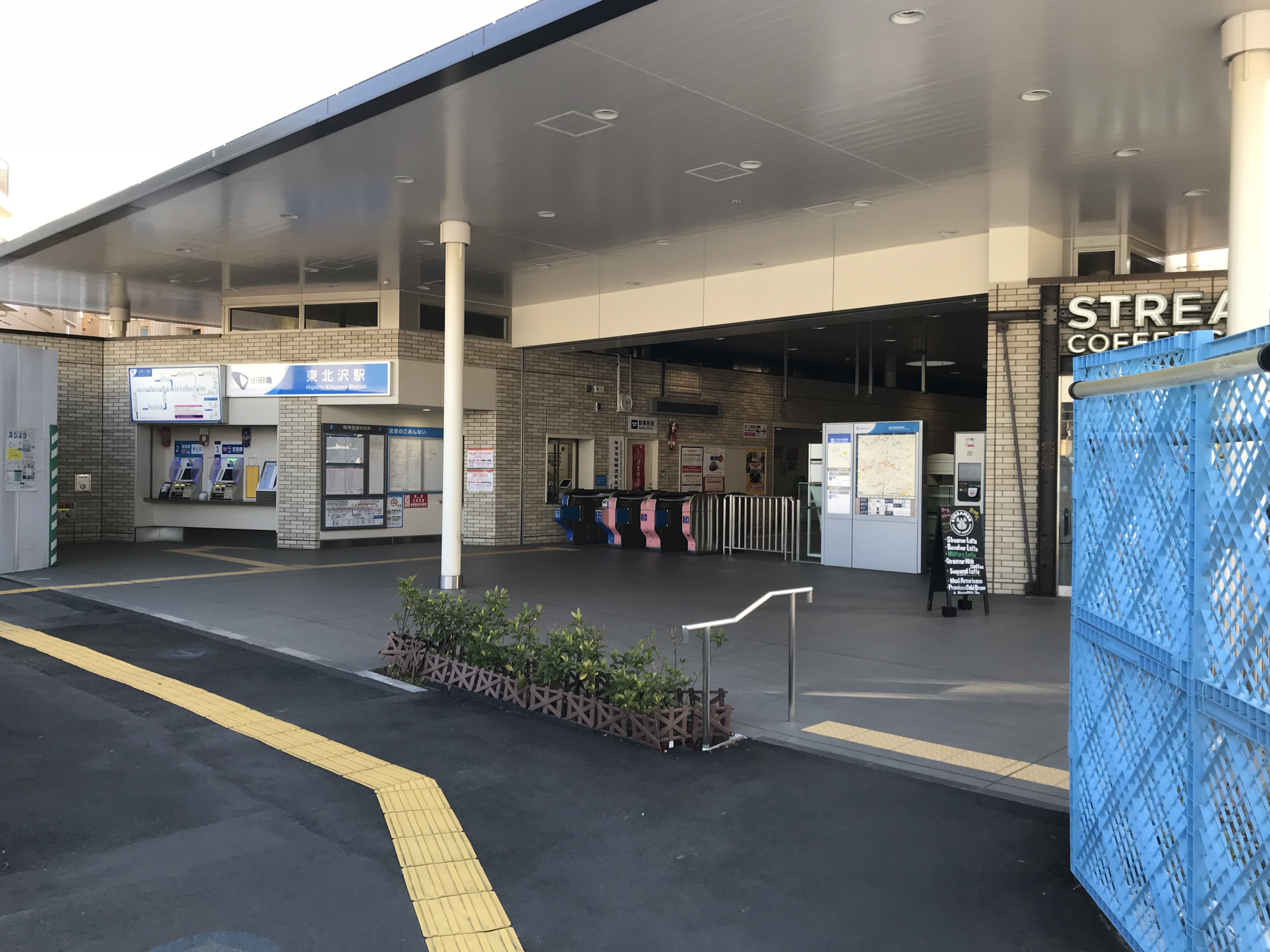 小田急小田原線東北沢駅東口